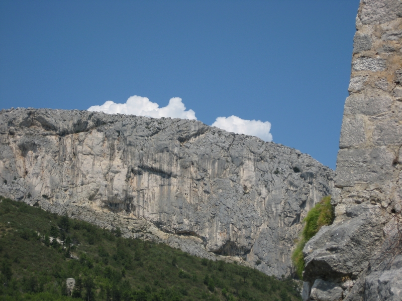 Kozjak (istočni dio), Split, Croatia